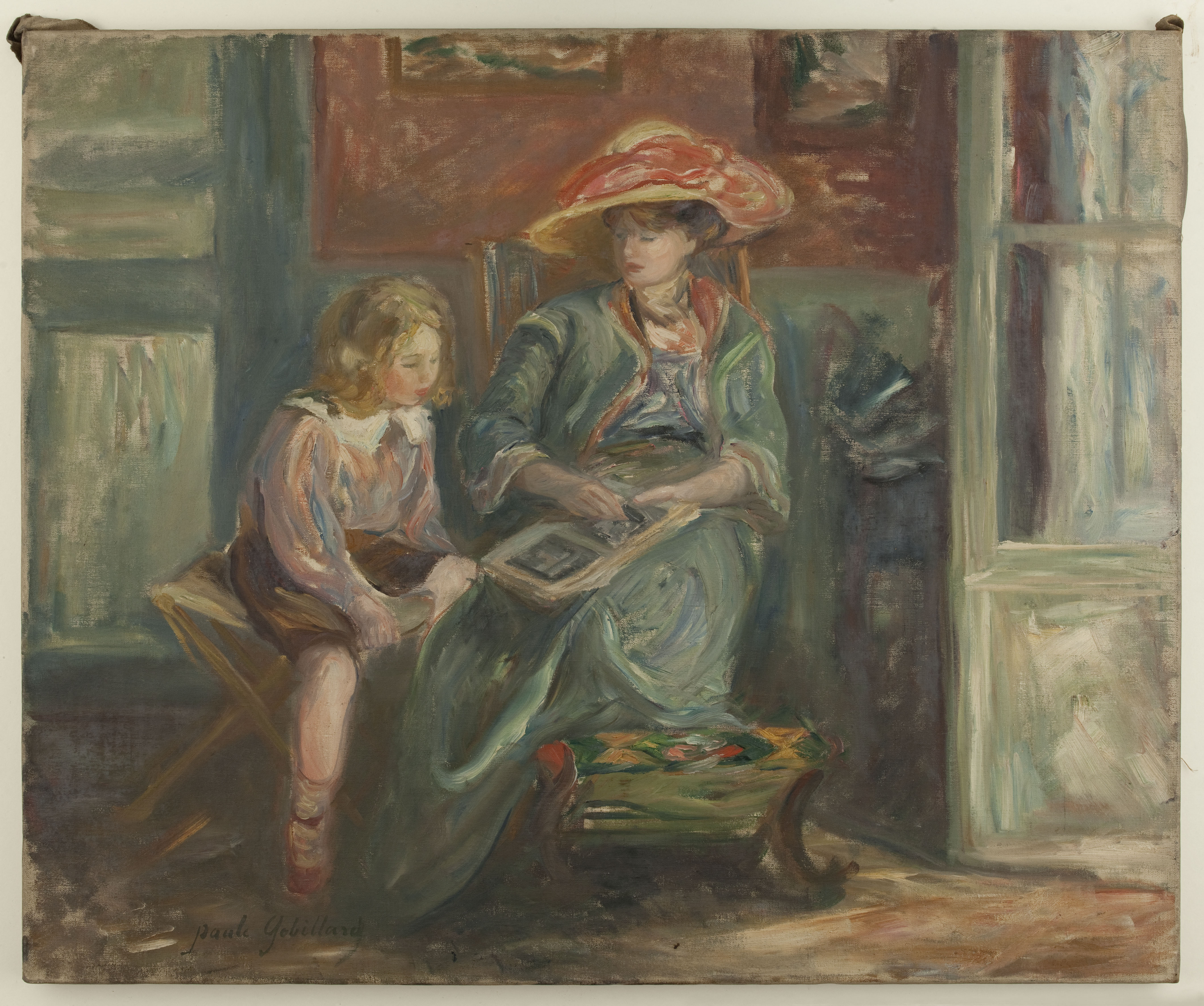 Peinture